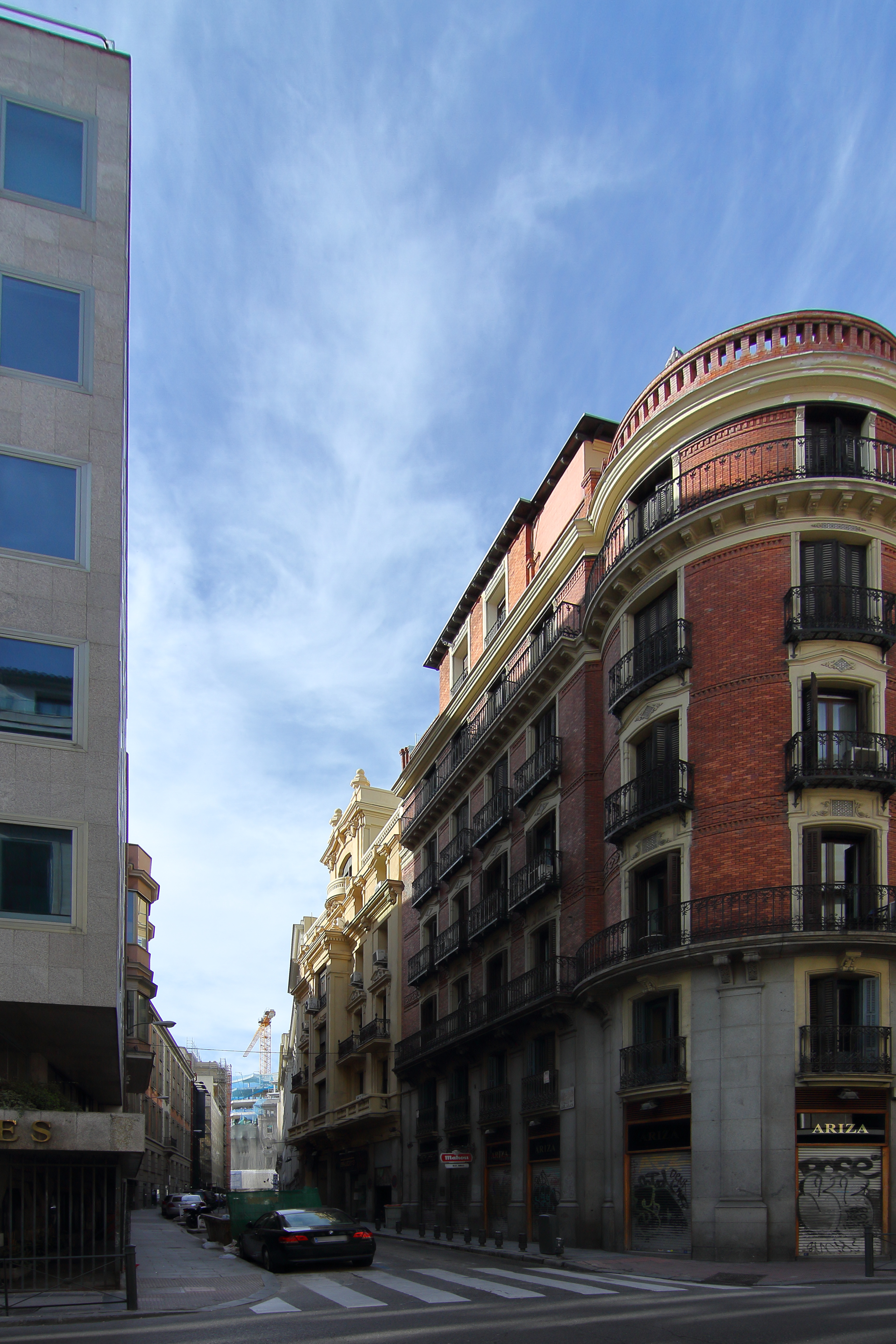 Calle de Arlabán, desde la calle de Cedaceros